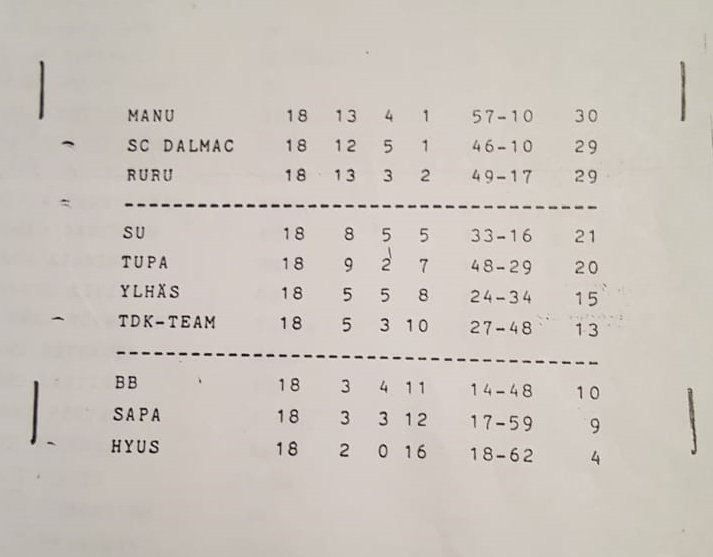 Salibandyn ensimmäisen SM-sarjakauden sarjataulukko